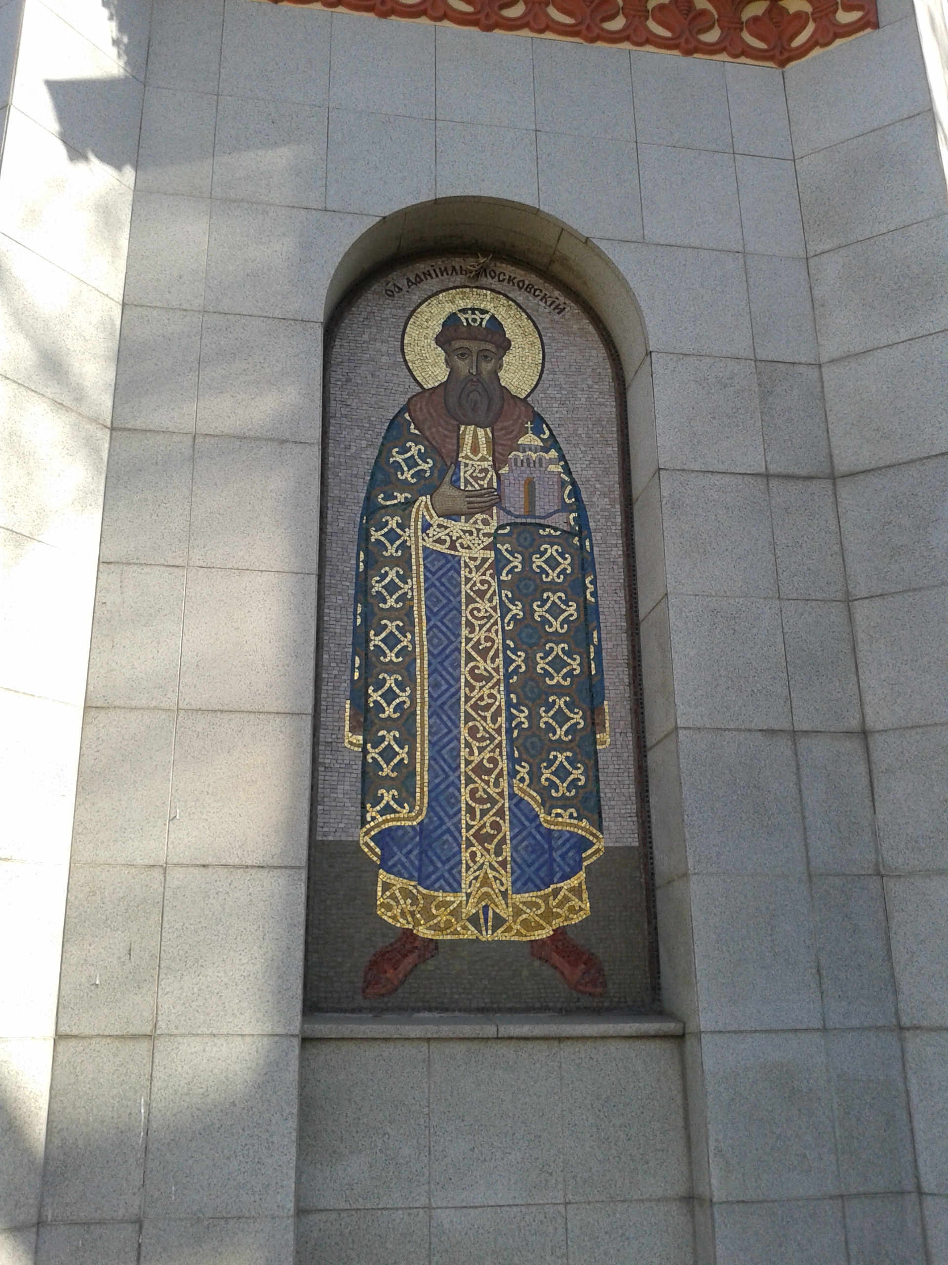 Икона св. Даниила Московского на фасаде часовни св. Даниила Московского. Москва, станция метро "Тульская" (рядом с Даниловым монастырём)